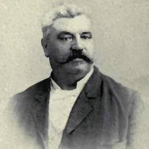 Roch Moïse Samuel Mignault